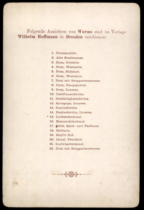 Revers des Vordrucks mit der fortlaufenden Nummerierung V. 15 (siehe unten) der Fotografie aus Worms im Verlag von Wilhelm Hoffmann in Dresden ...